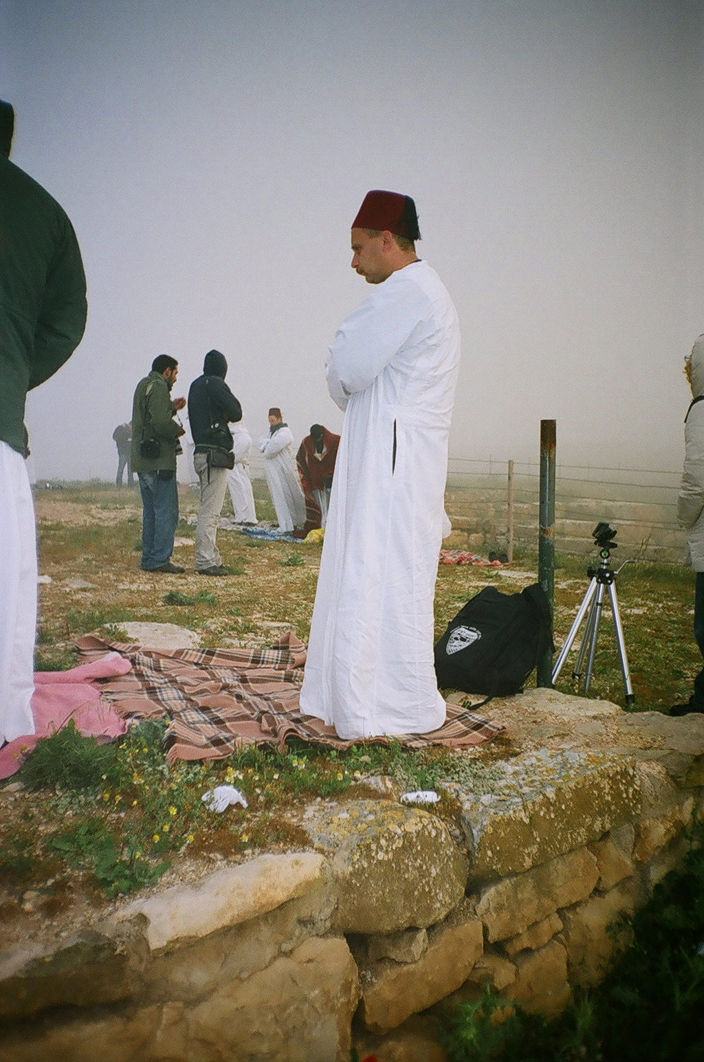 Samaritano con fez